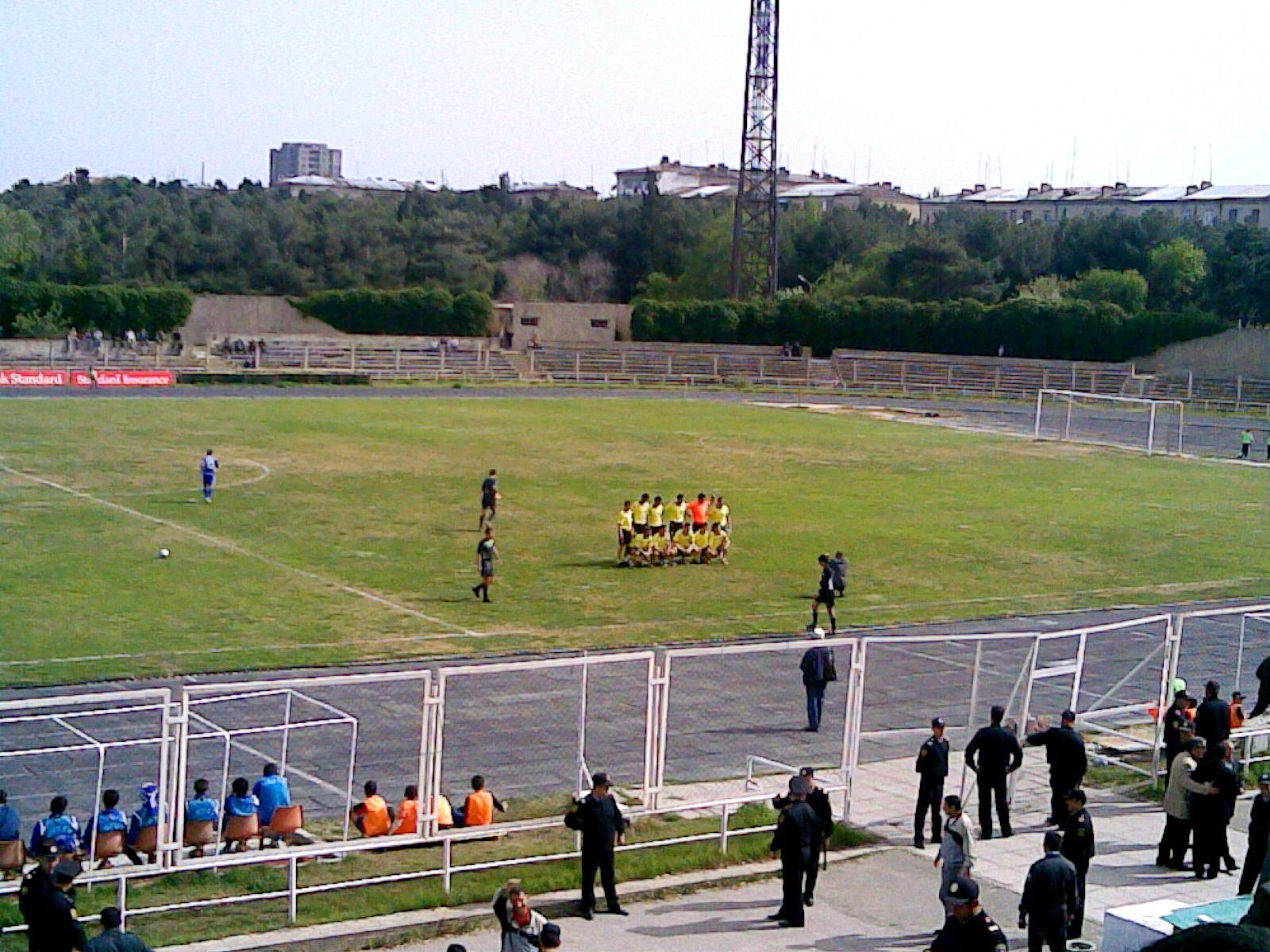 Gənclərbirliyi (Sumqayıt) - İnter (Bakı) 0:3; Bu oyun 2007/2008 mövsümündə Futbol üzrə Azərbaycan Çempionatında Gənclərbirliyi FK-nın Mehdi Hüseynzadə adına Sumqayıt şəhər stadionunda son oyunu olmuşdur.